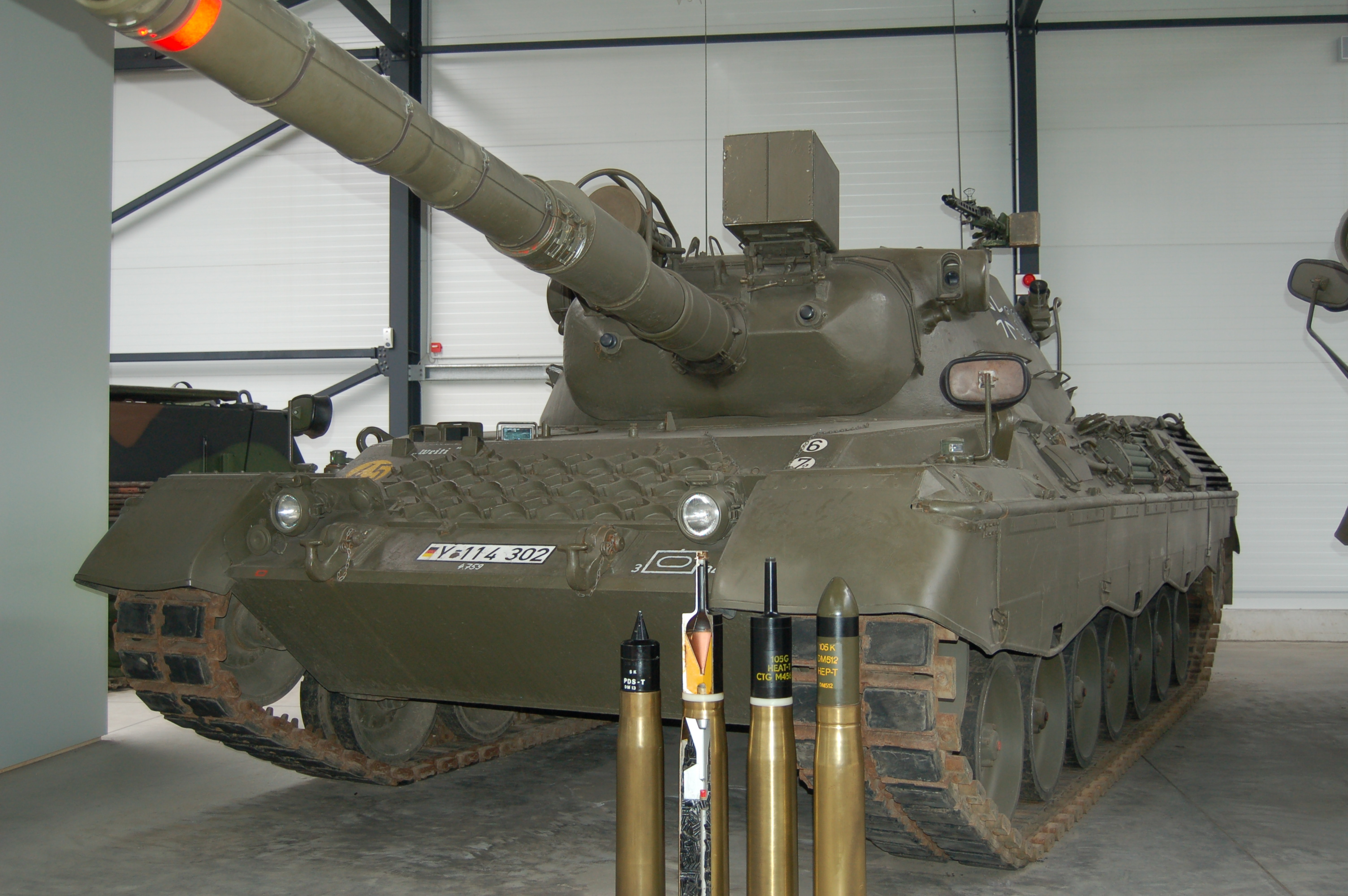 Mittlerer Kampfpanzer "Leopard" I A2 A1 Besatzung: 4 Soldaten Gewicht: 42,4 Tonnen Motorleistung: 610 kW (830 PS) Bewaffnung: 1 Bordkanone 105 mm L/51, sowie Blenden u. Flieger-Abw-MG, Kaliber: 7,62 mm x 51 Besonderheiten: Nachtkampffähig (PZB 200), Unterwassertauglich und Waffenstabilierungsanlage Baujahr: 1972 - 1973 Stückzahl Bw: 232